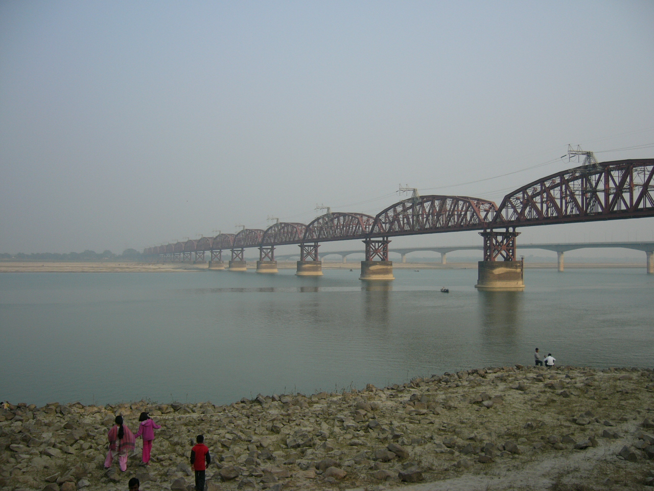 Hardinge Bridge Bangladesh